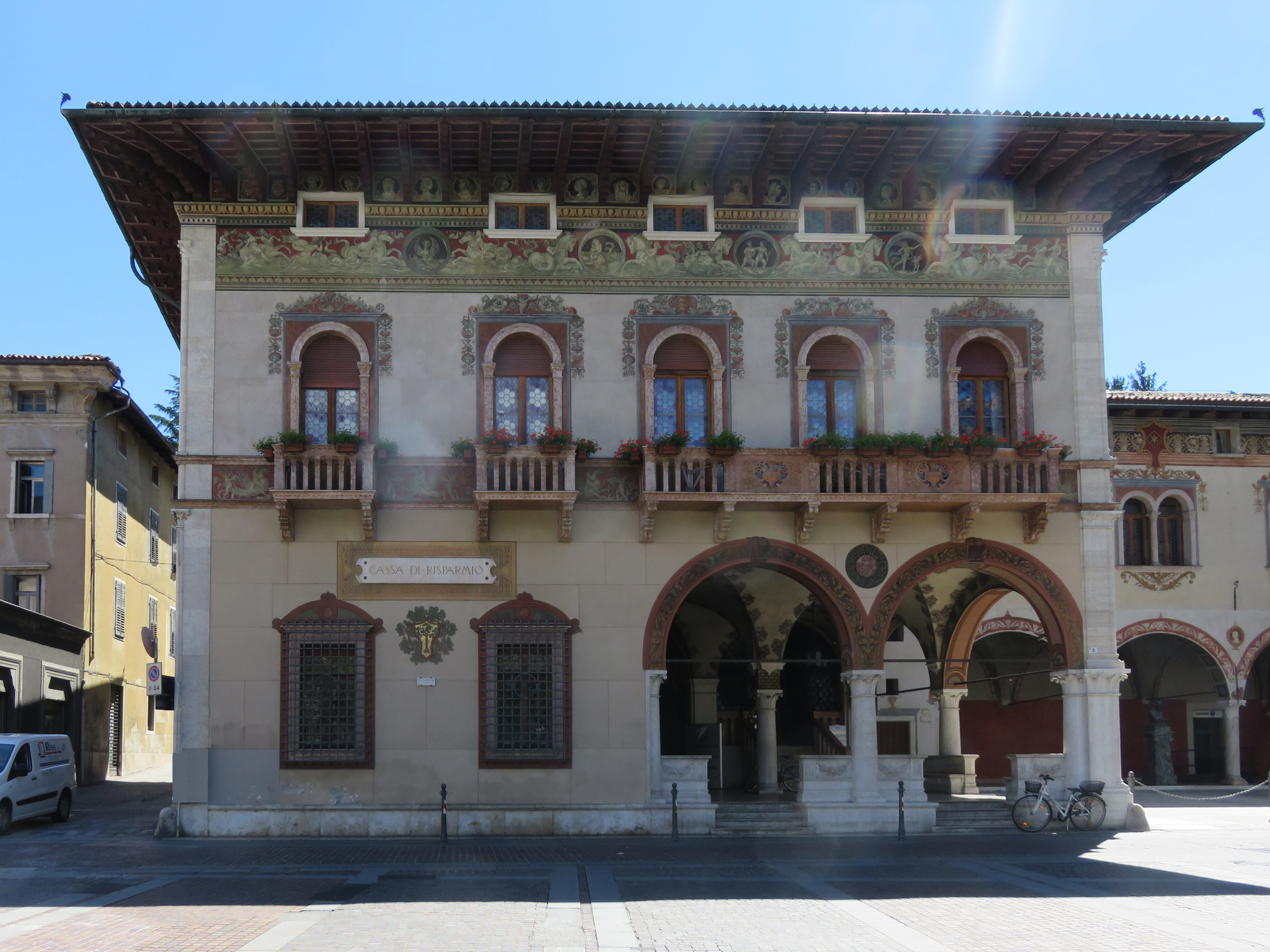 Palazzo Del Bene - d’Arco, piazza Rosmini, Rovereto. In passato Sede della Cassa di Risparmio di Rovereto, ora Unicredit, e sede della Fondazione Caritro